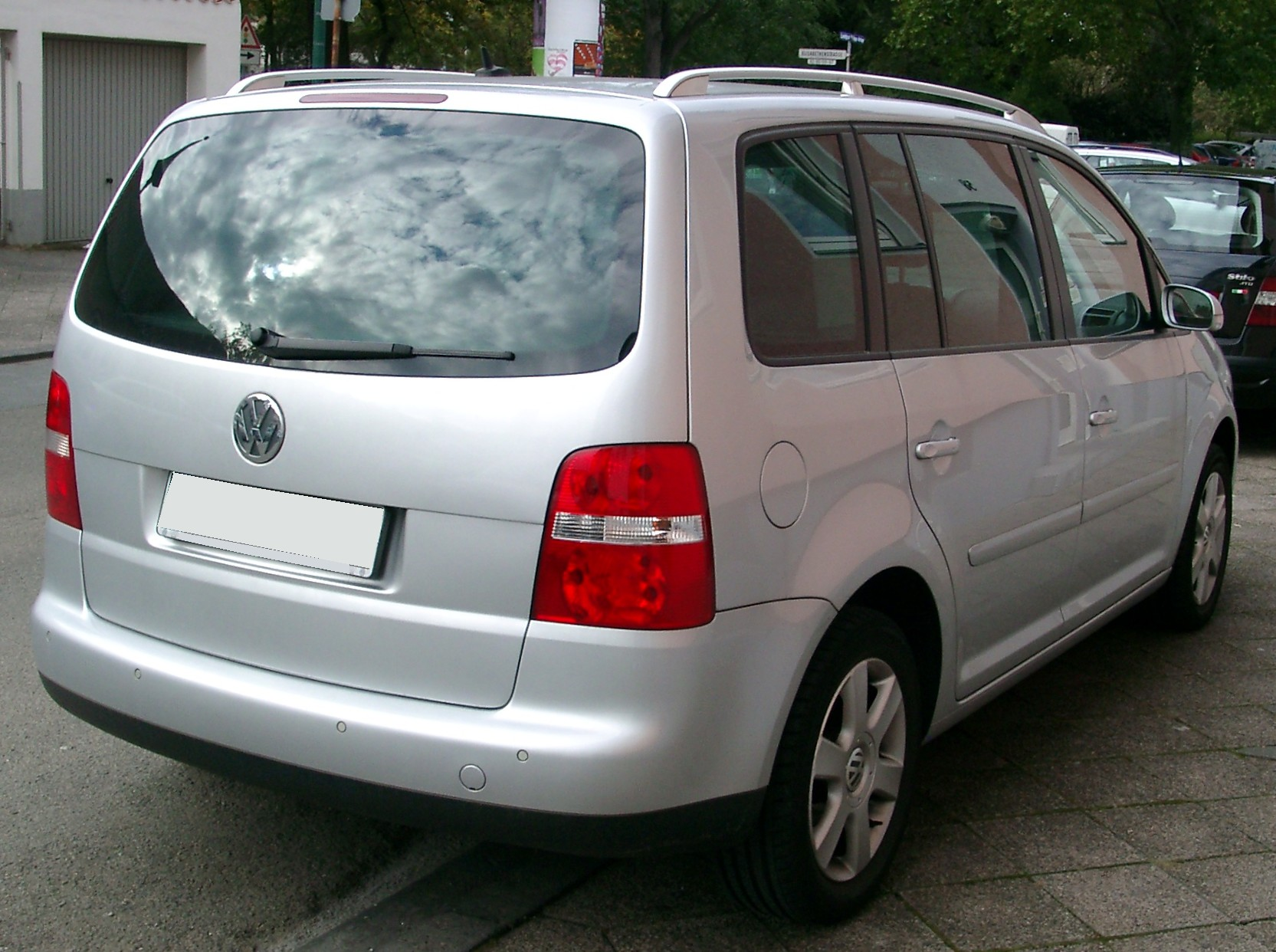 VW Touran